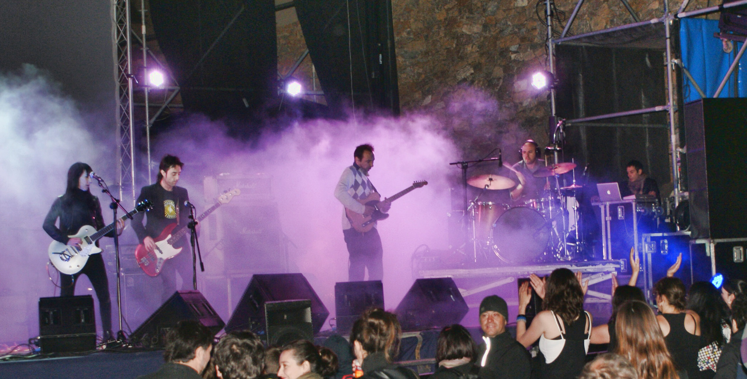 Momento de un concierto de Explum 2011